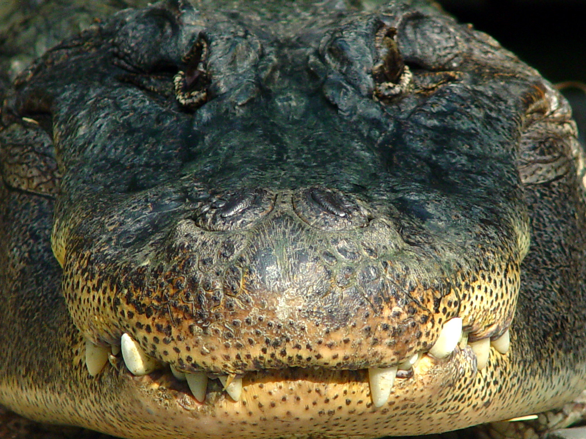 Bogazici Zoo Crocodile